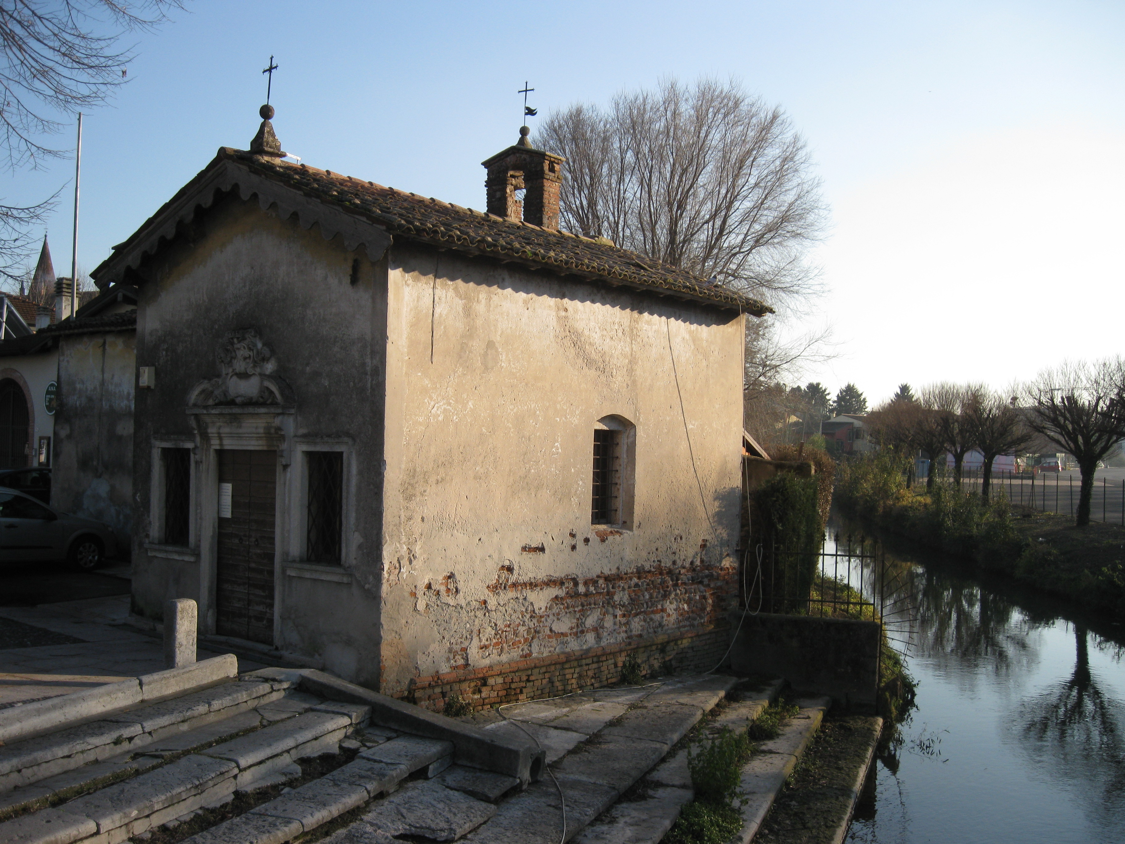 Chiesa della Formica i Isola della Scala, Italien